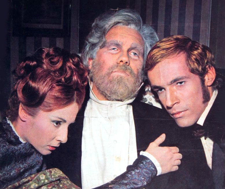 Foto di scena dello sceneggiato televisivo I miserabili, regia di Sandro Bolchi (1964). Nella foto gli attori Giulia Lazzarini, Gastone Moschin e Roberto Bisacco Tratta da "Radiocorriere TV" n. 16, anno XLI, 5 aprile 1964